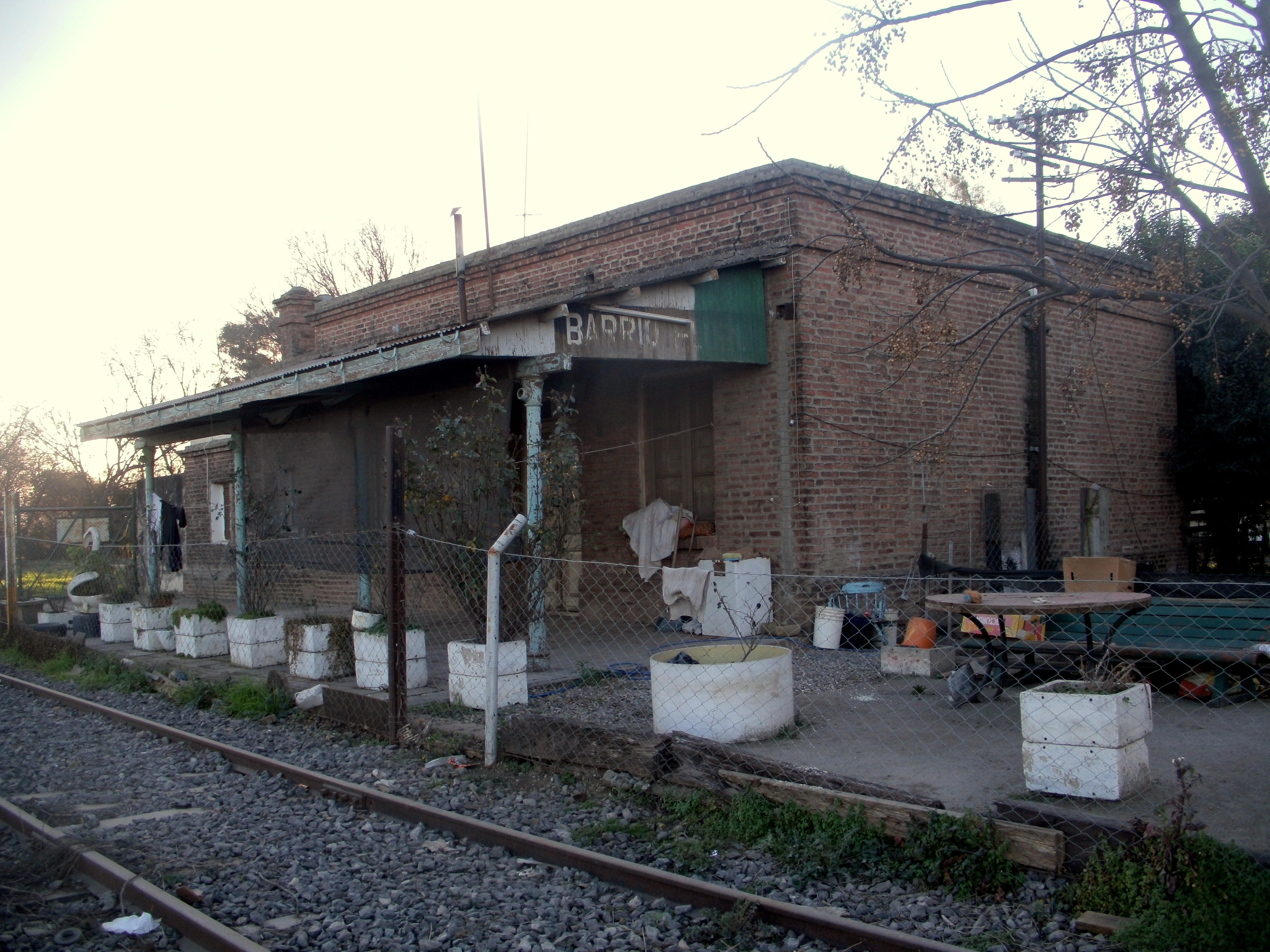 Estación Barrio Flores vuelta vivienda familiar